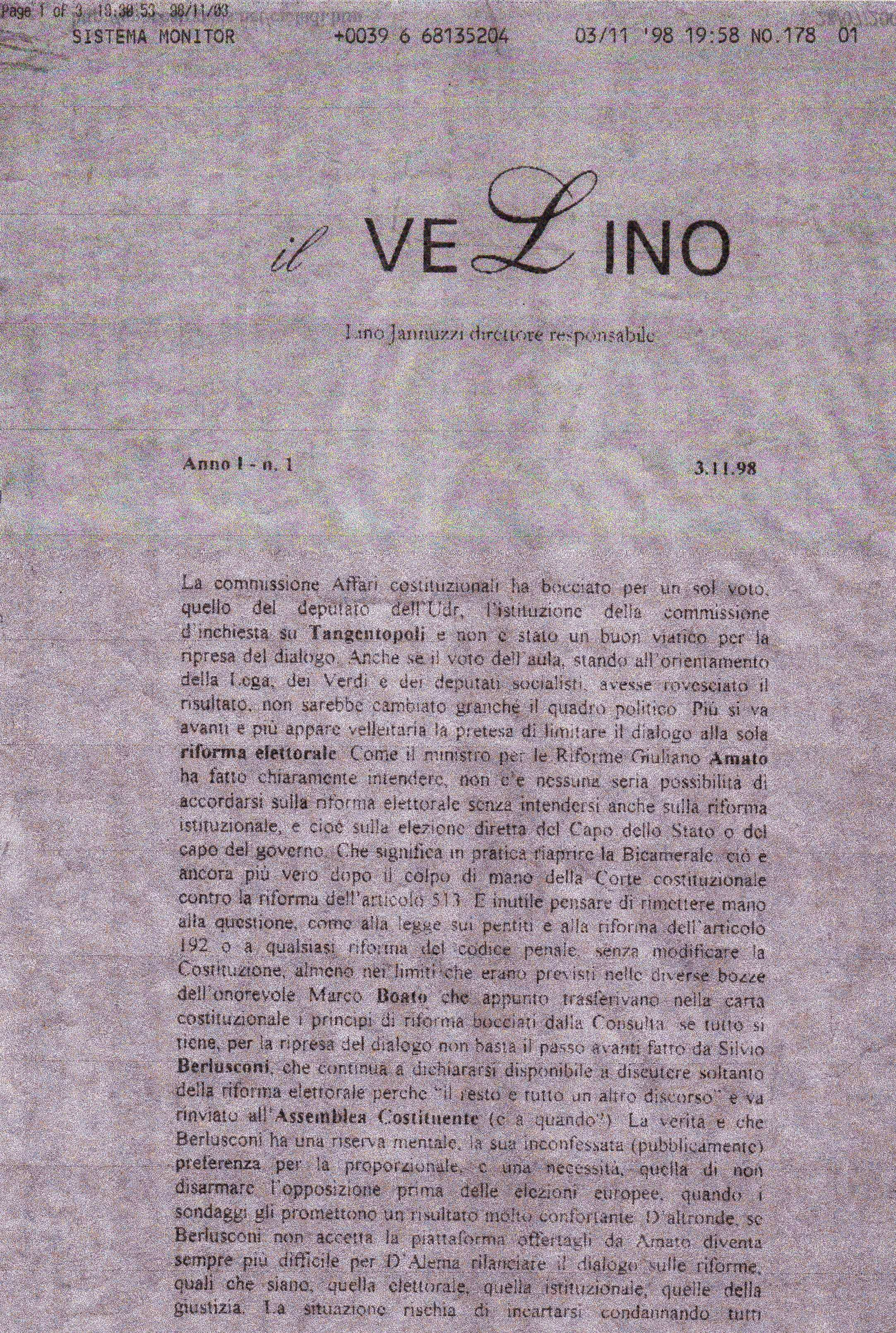 Primo dispaccio dell'Agenzia di stampa il Velino. Edizione inviata via FAX come unico mezzo di trasmissione